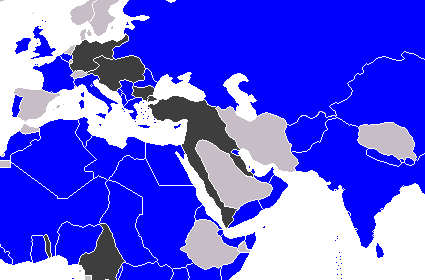 Karte des Ersten Weltkriegs im orientalischen Raum.